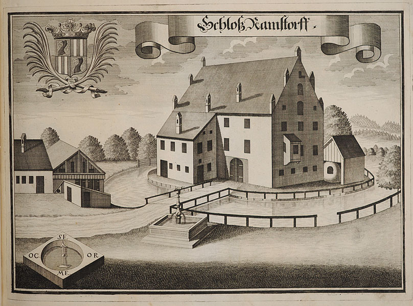 “Schloß Ramstorff" (Wallerfing-Ramsdorf), aus : Beschreibung des Churfürsten- und Hertzogthumbs Ober- und Nidern Bayrn. Rentamt Landshut, Gericht Osterhofen, 1723